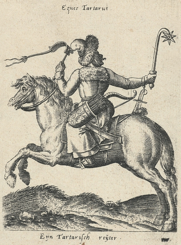 Абрахам де Брюин (Abraham de Bruyn) (г.ж. 1540–1587) среди своих работ привел немало восточных типажей, а среди них и татар. Один из них находится в альбоме среди семидесяти шести всадников той эпохи (Illustrations de Diversarum gentium armatura equestris. Ubi fere Europae, Asiae atque Africae equitandi ratio propria ewpresaa est) (1575 г.)